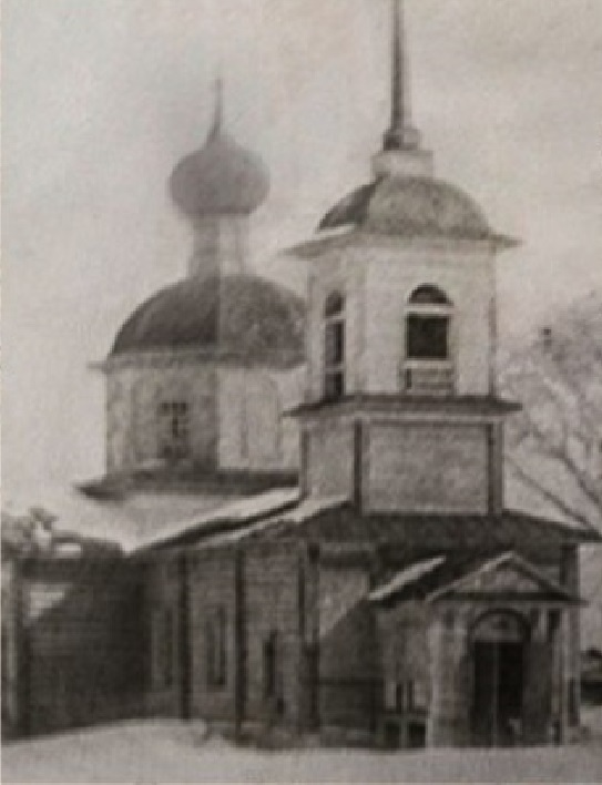 Храм Успения Пресвятой Богородицы в селе Чермные Основан в 1847г., сгорел в конце 1960-ых.